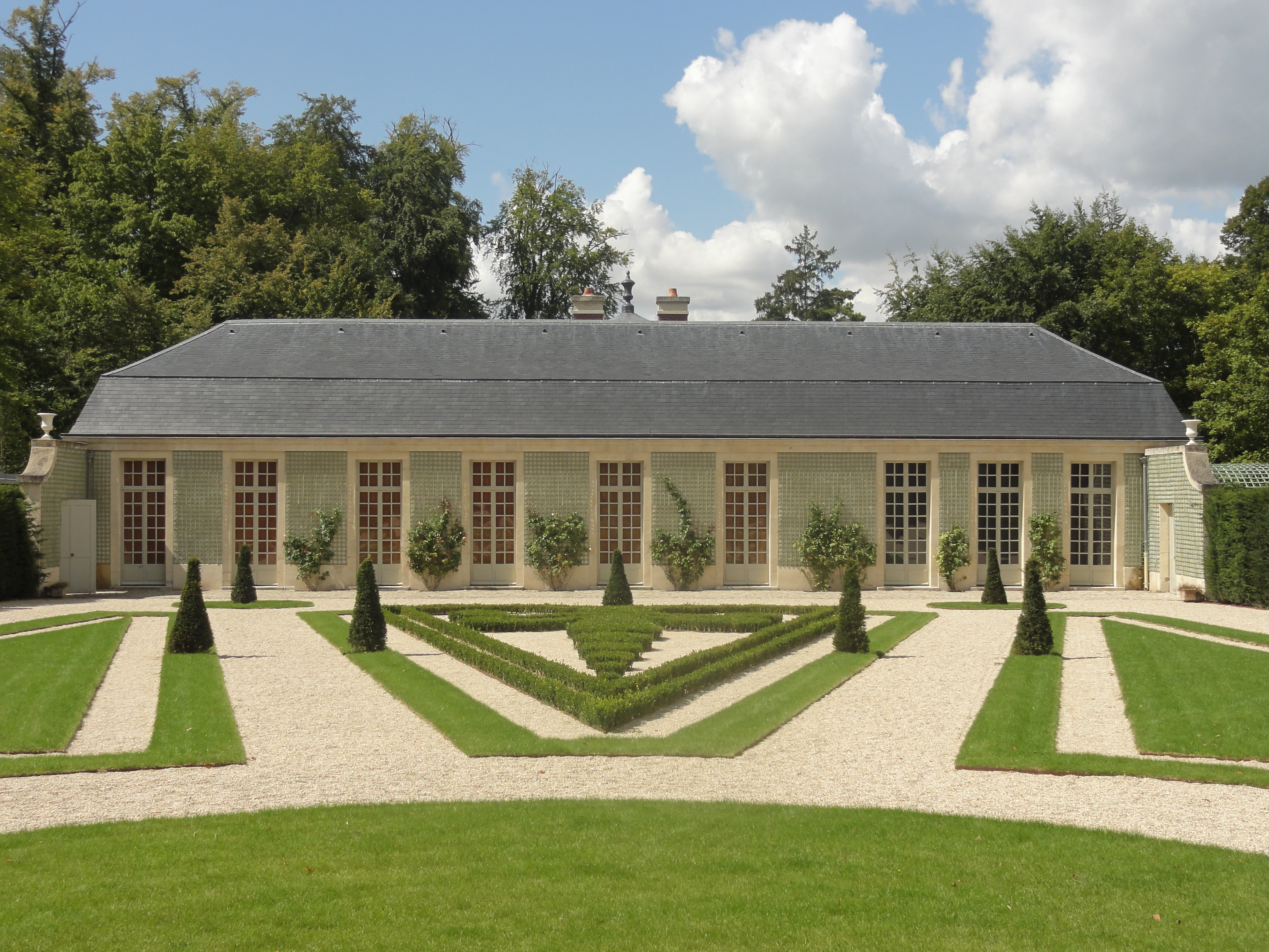 Le pavillon de Sylvie après sa restauration, façade sur le jardin.